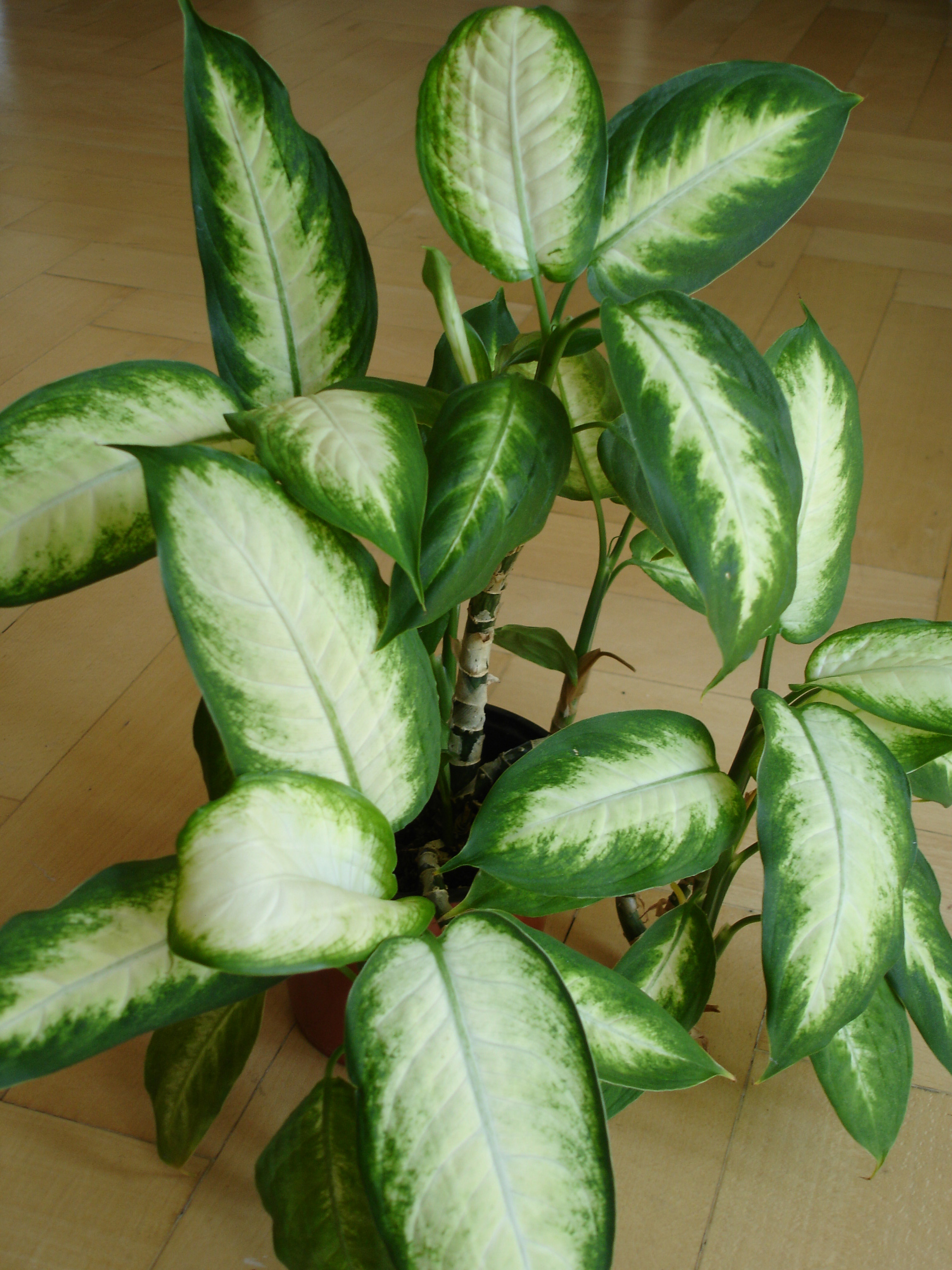 Dieffenbachia bowmannii var. Camilla